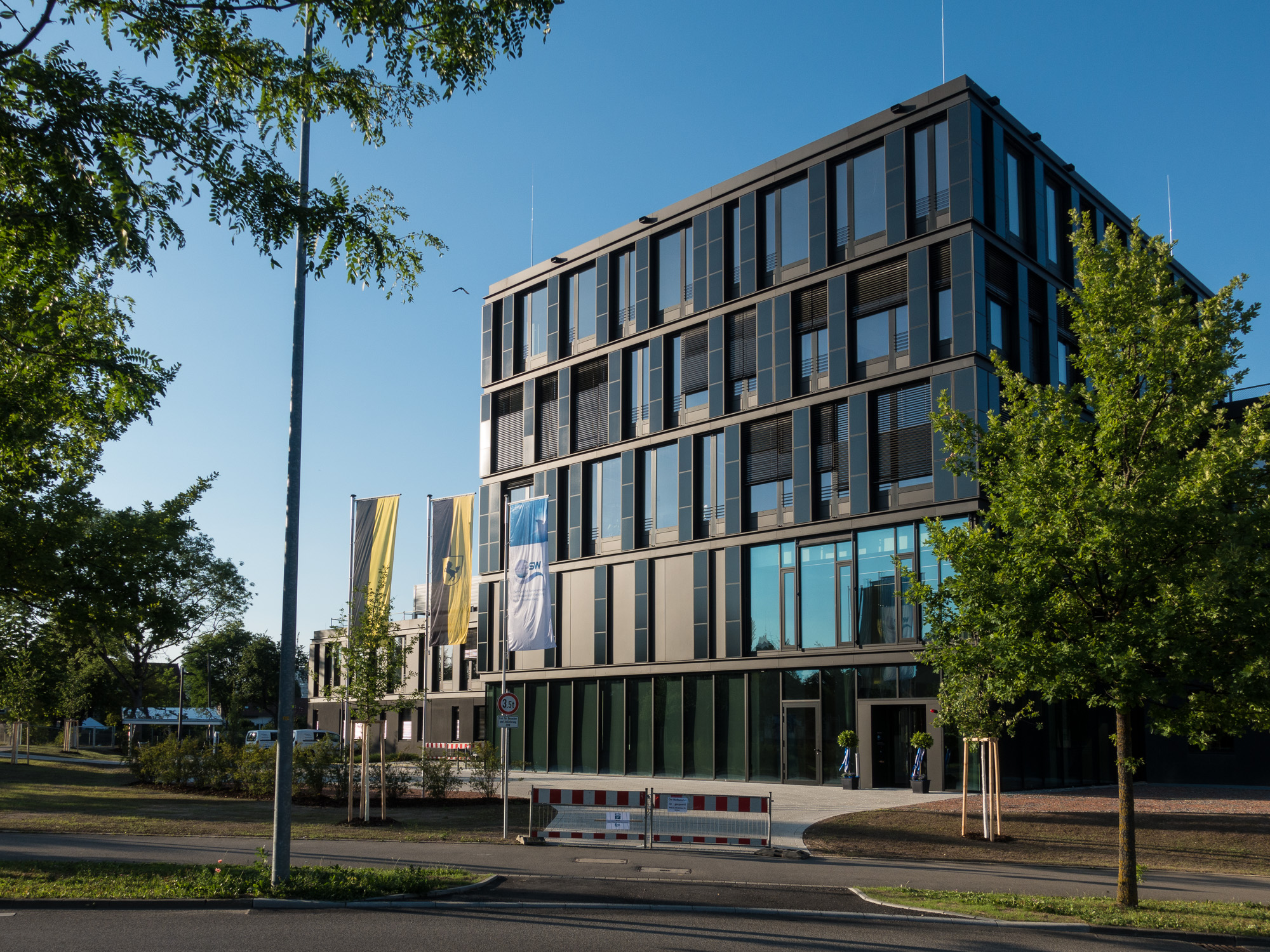 Institutsgebäude des ZSW in Stuttgart mit Solarfassade aus CIGS-Dünnschicht-Solarmodulen